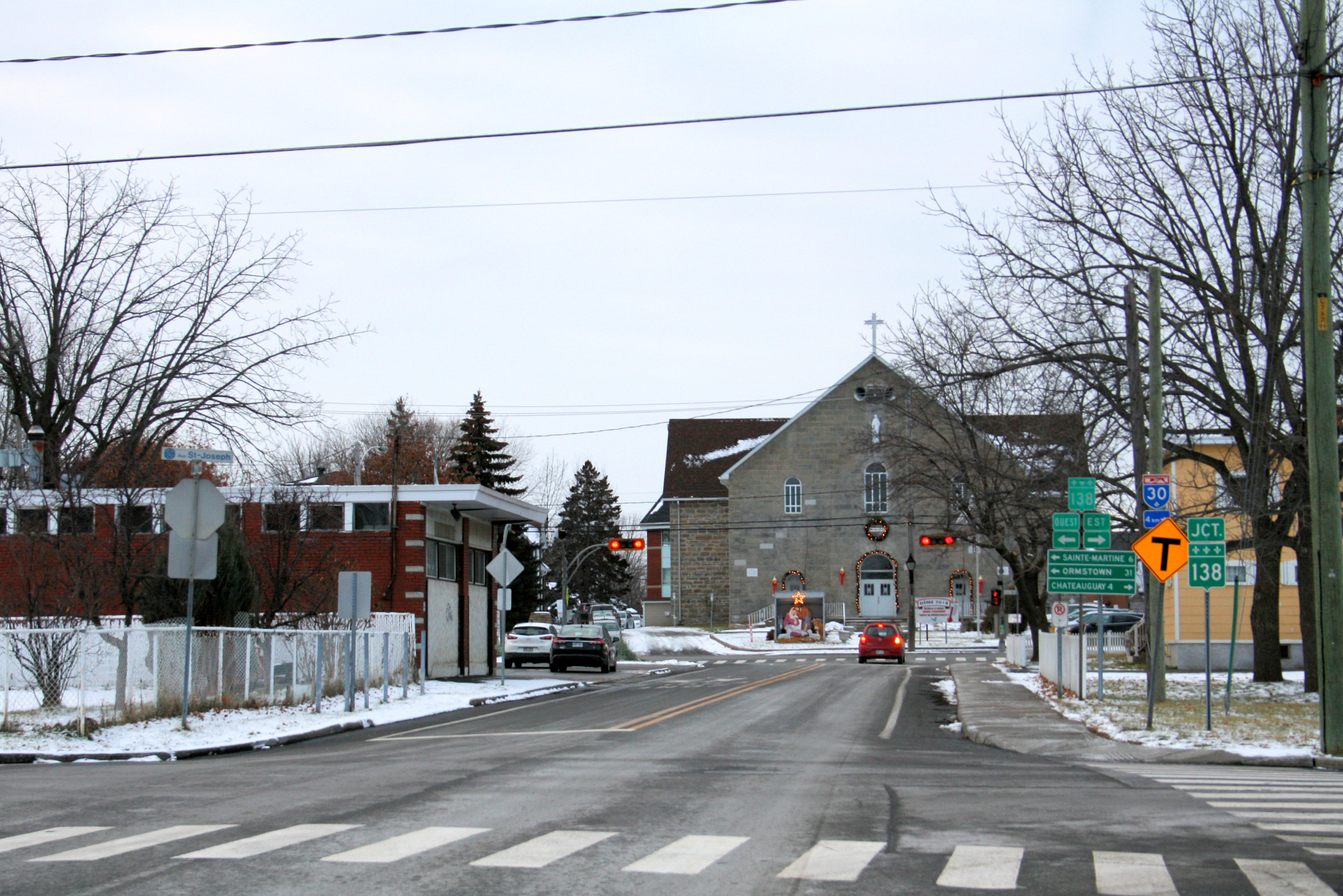 Mercier, Quebec, Canada